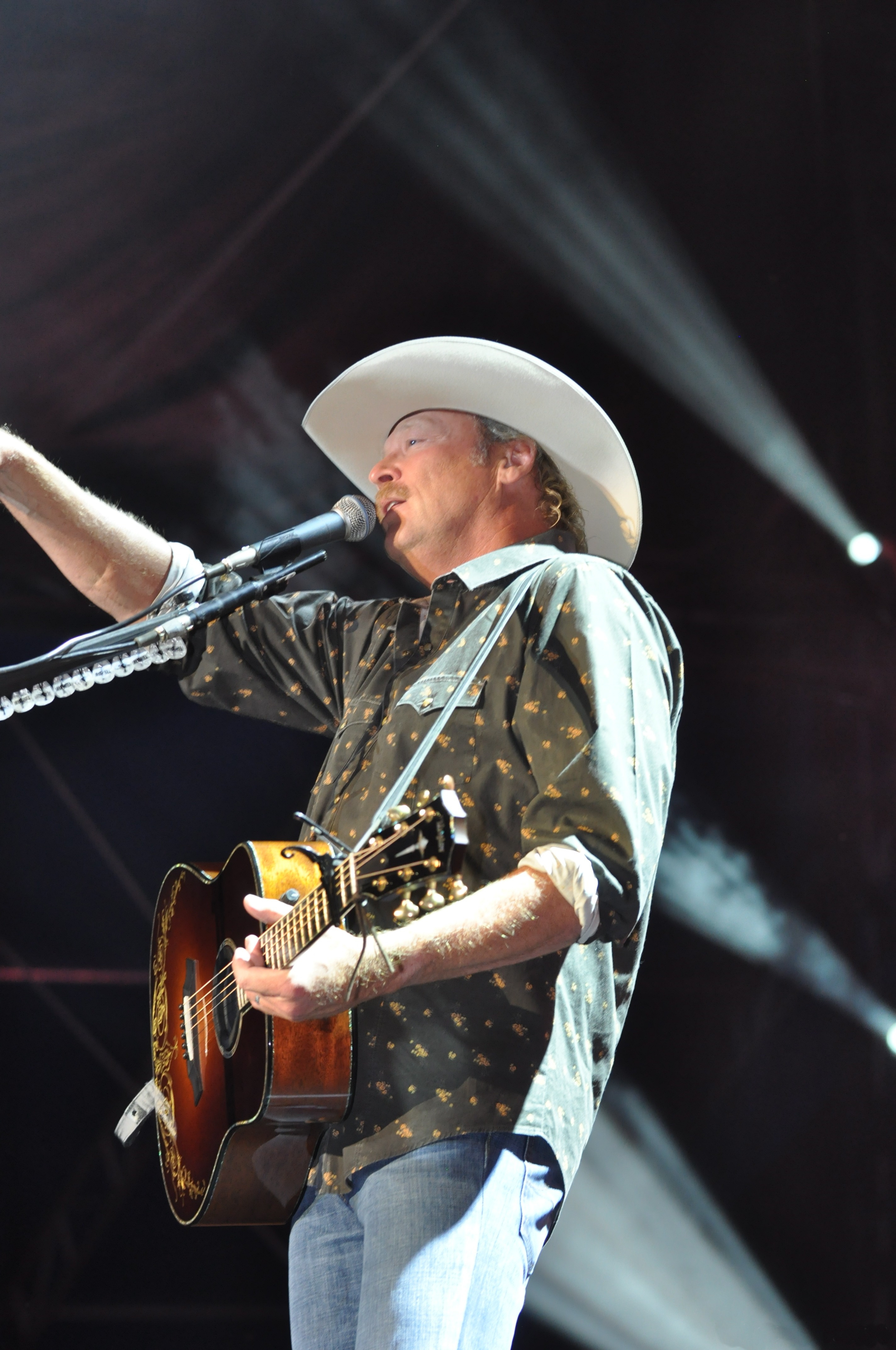 Alan Jackson -DSC_9899-8.24.12